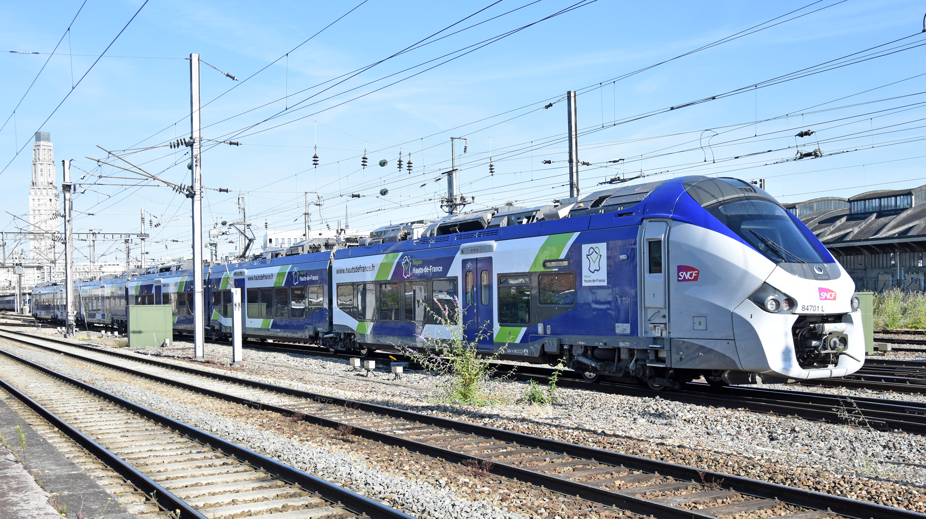 B 84701/02 (84701L) à Amiens